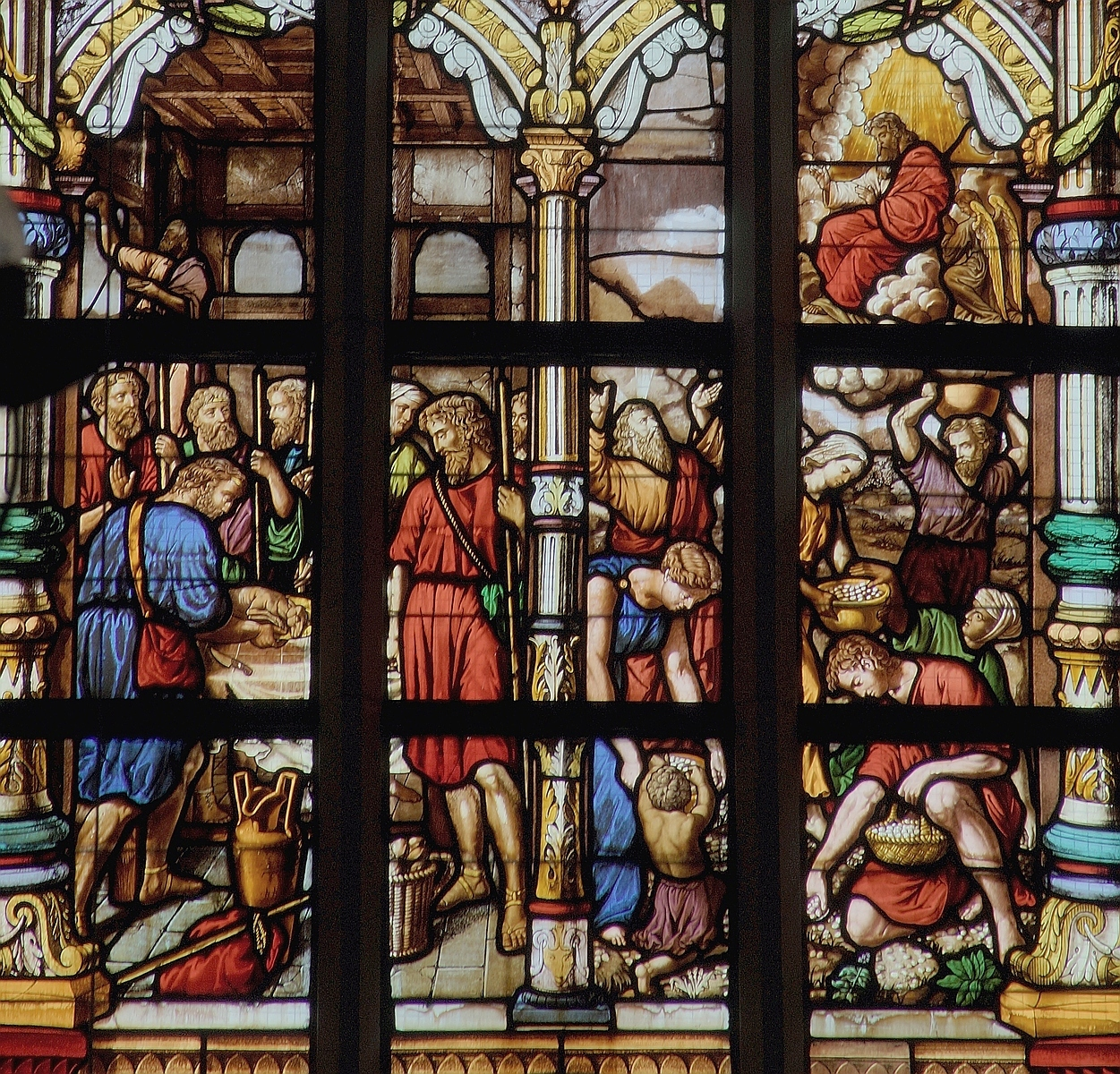 Sint-Pieterskerk (Turnhout) - Detail van het glasraam in de kruisbeuk (zuidkant) door Charles Lévêque (Beauvais) (anno 1881)